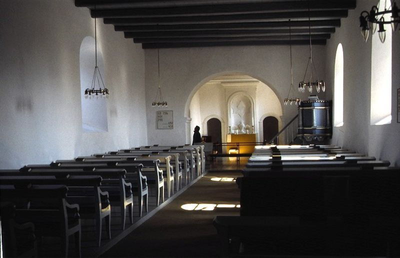 Grønning Kirke Kirkerummet set mod øst, Skive Kommune, Jylland, Denmark